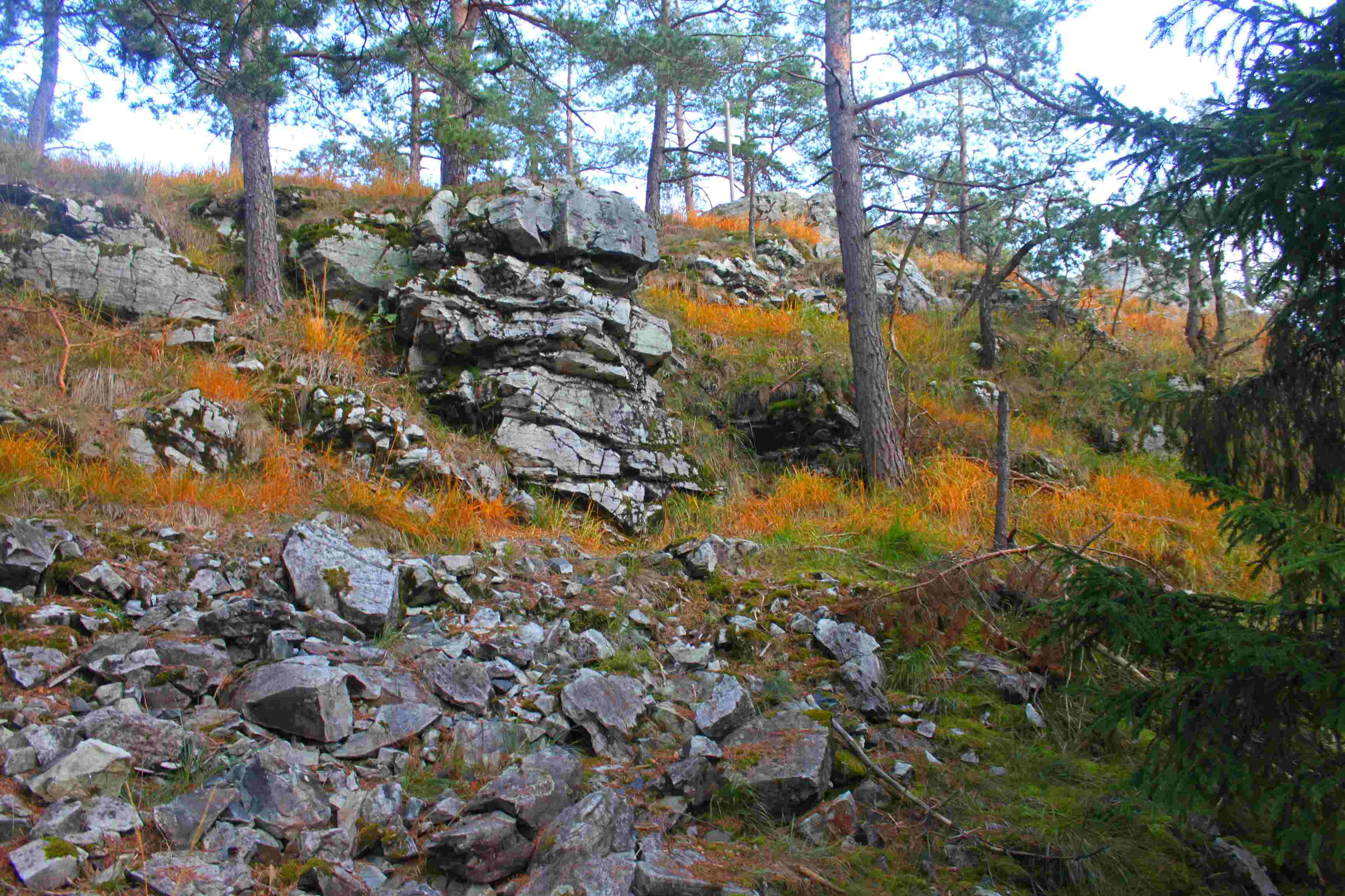 Der 589 Meter hohe Magnetberg Peterleinstein von Kupferberg in Richtung Marktleugast ragt markant aus dem Wald heraus. Besonders machen den Peterleinstein die seltenen Pflanzen, die dort zu finden sind. Der Berg besteht aus grünlichen Serpentinit, einem sehr basischen Gestein, auf dem nur karge Vegetation gedeiht, außerdem ist das Gestein magnetisch.